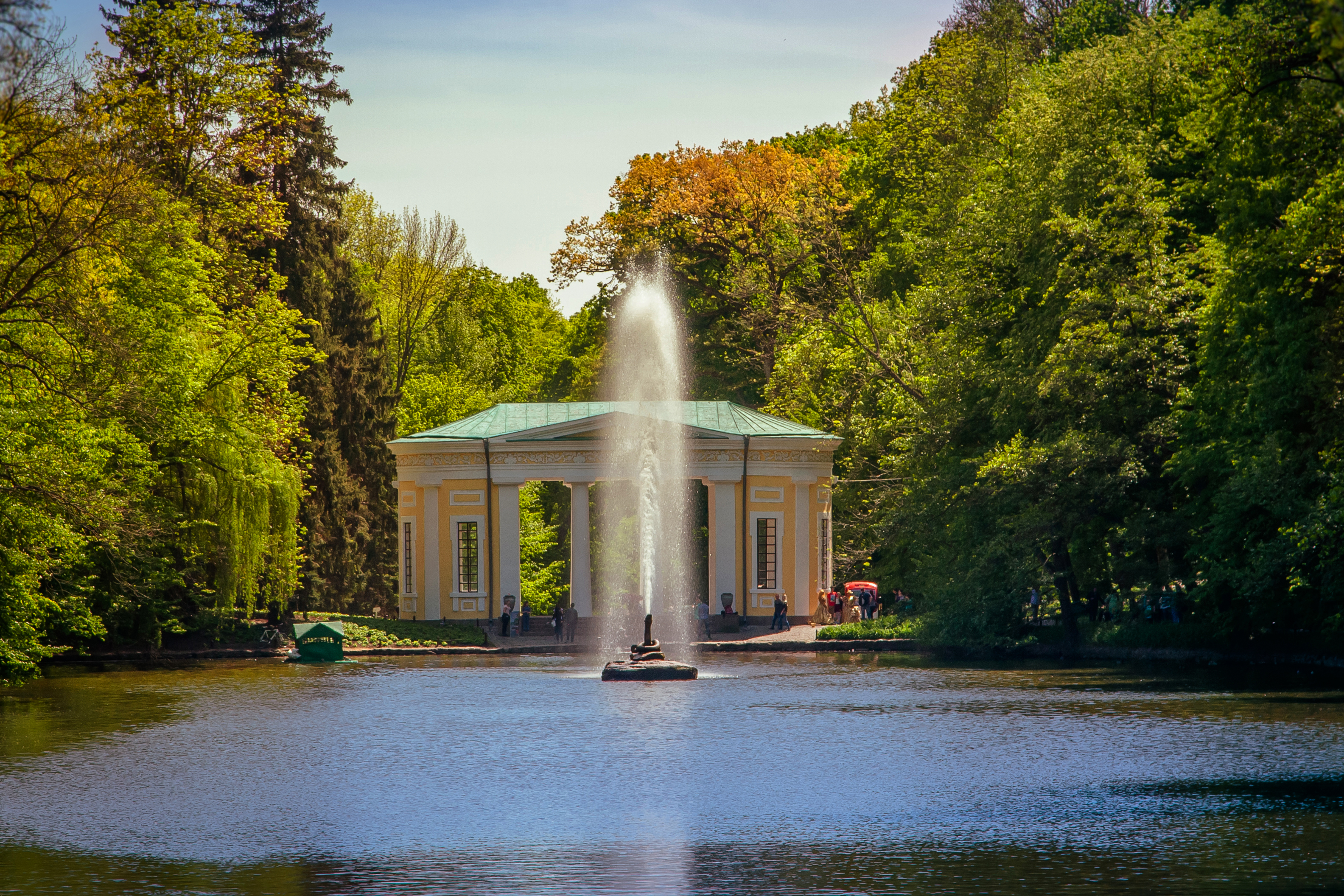 «Софіївка», Уманський район, м. Умань